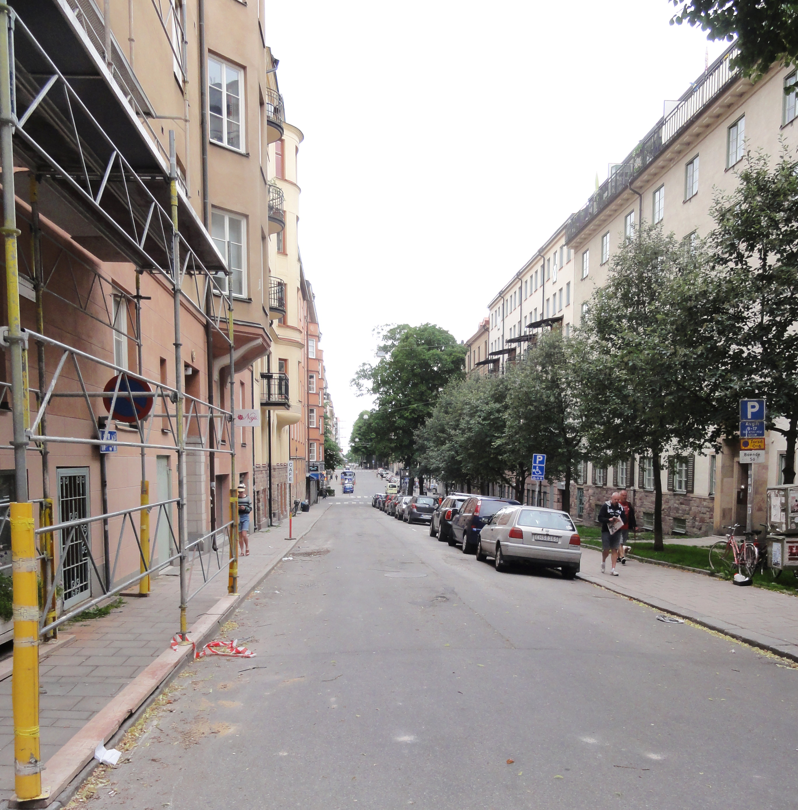 Wollmar Yxkullsgatans början